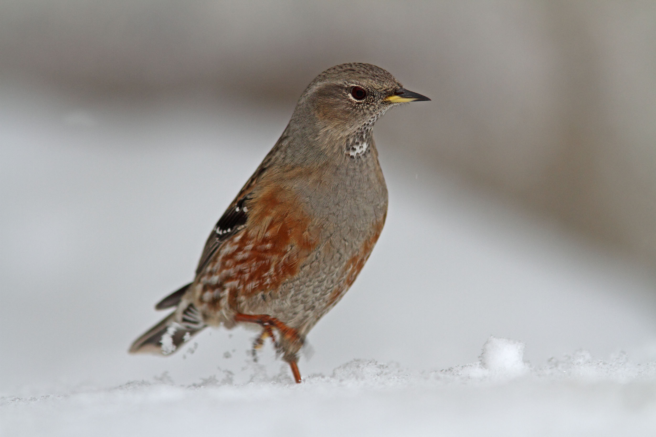 Alpenbraunelle (Prunella collaris) an einem Überwinterungsplatz in Österreich